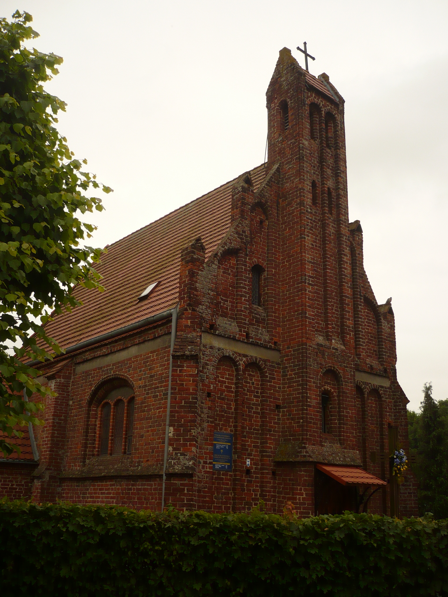 Trzebiatów. Kaplica pw. św. Gertrudy